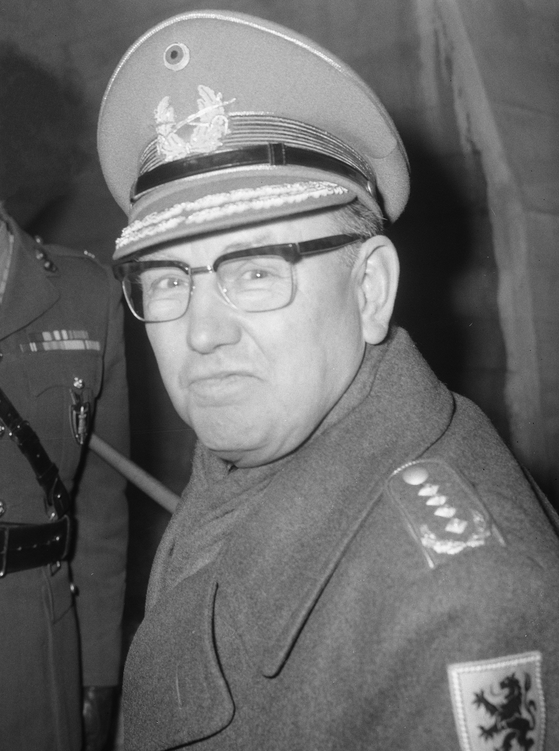 Generaal Von Kielmansegg inspecteerde het nieuwe hoofdkwartier te Brunssum, Generaal Von Kielmansegg (kop) Datum